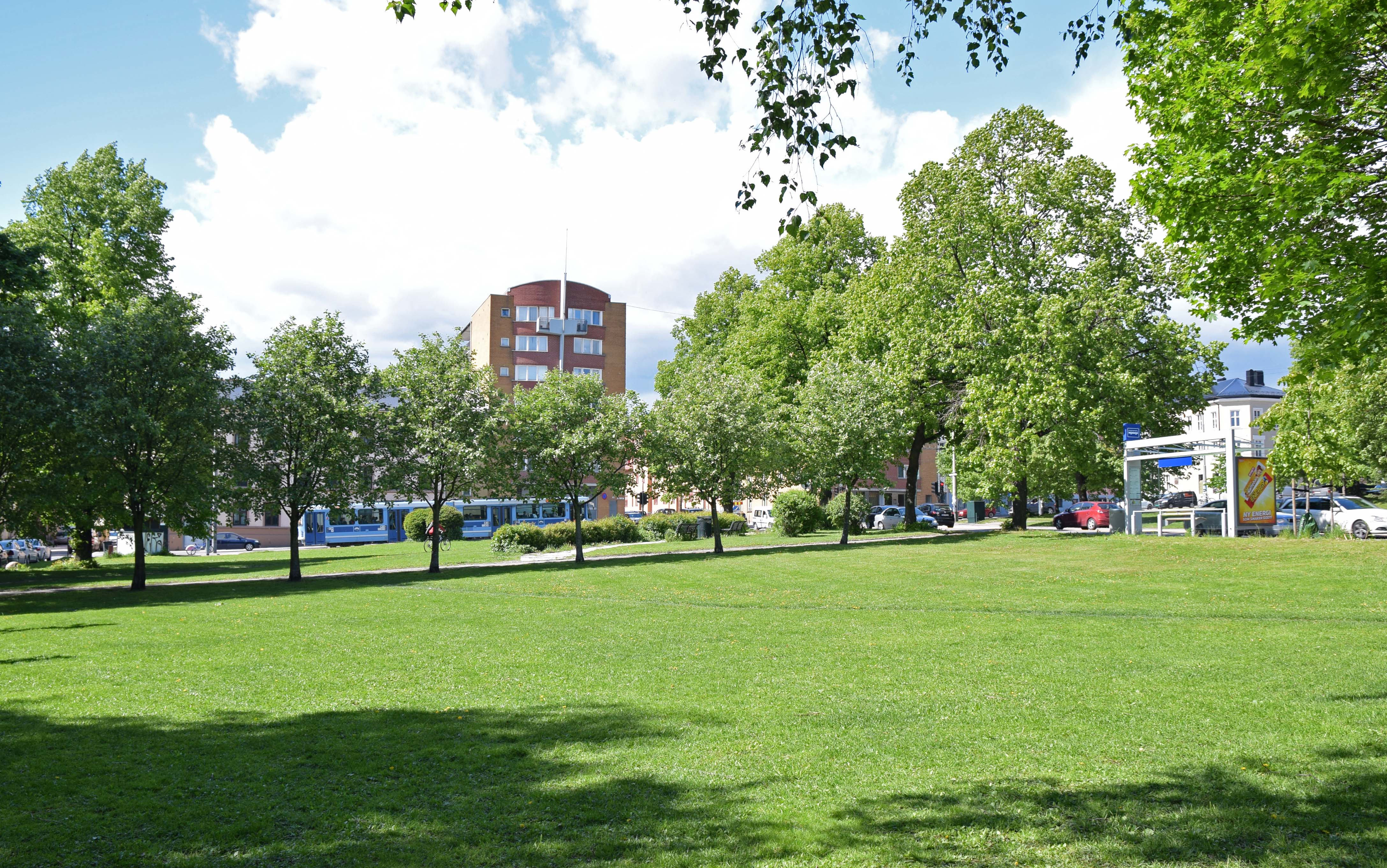 Hallénparken er en park ved Christian Michelsens gate på Grünerløkka / Torshov i oslo